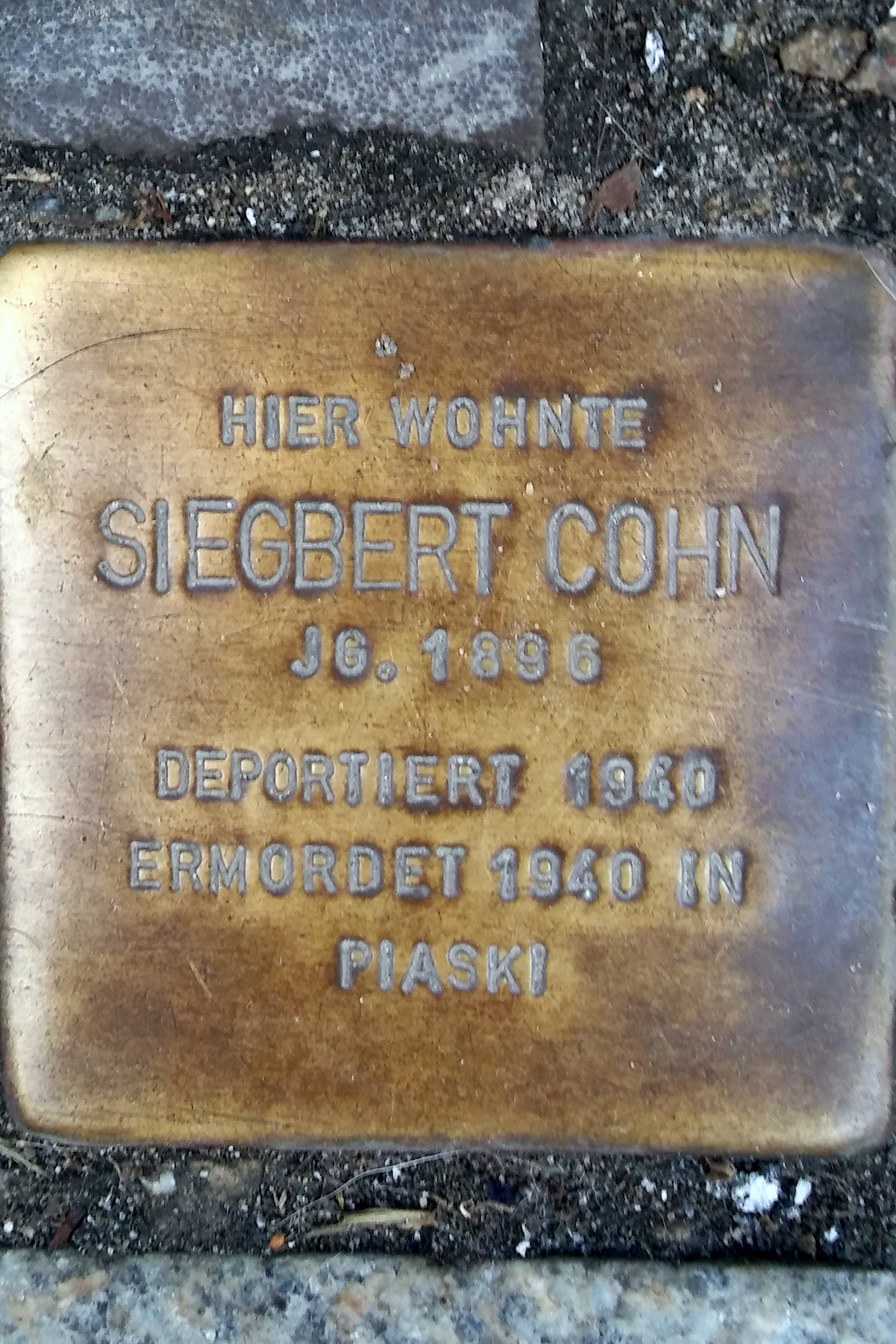 Stralsund, Mönchstraße 37, Stolperstein Siegbert Cohn